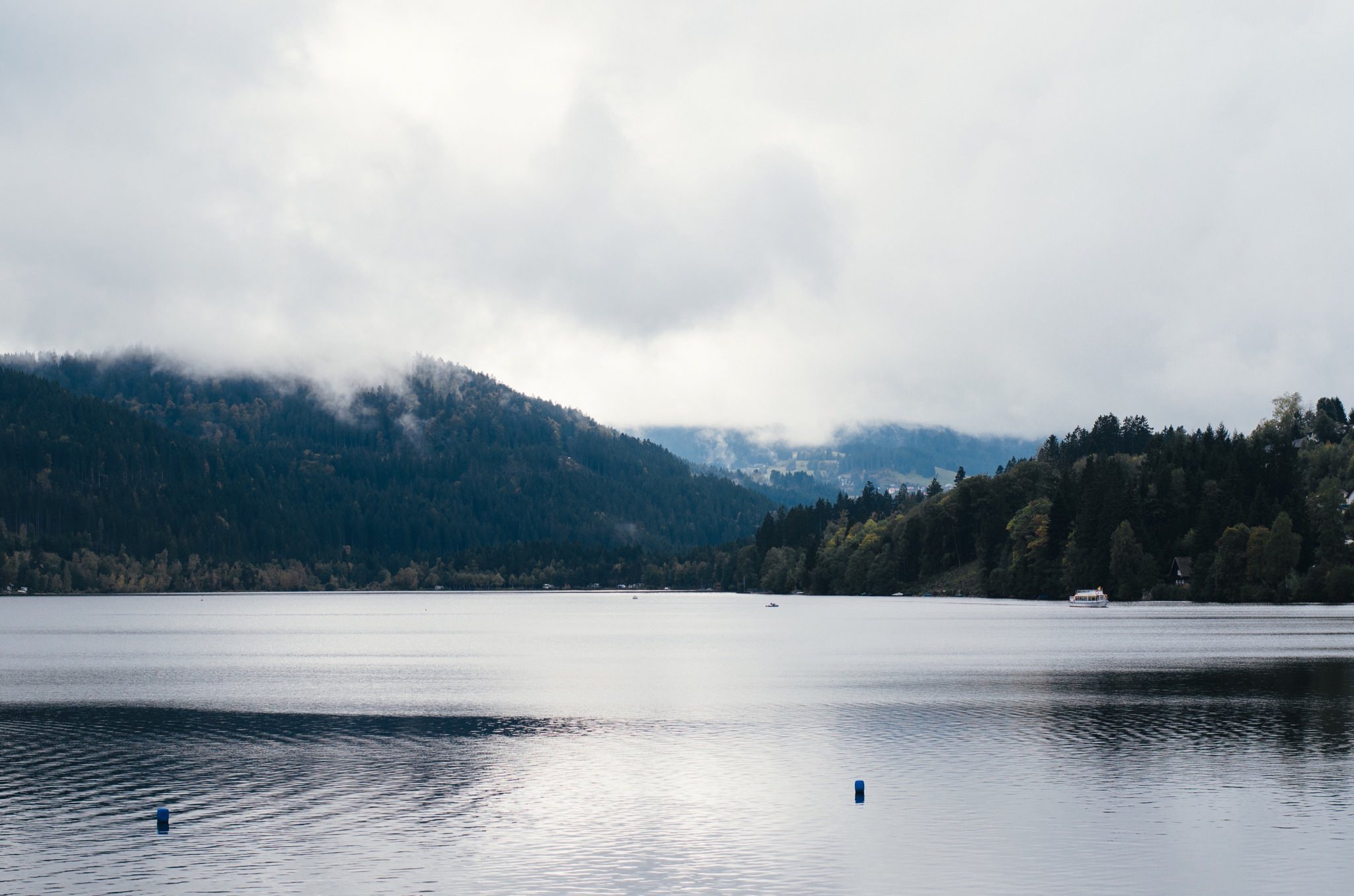 Der Titisee im Schwarzwald an einem nebeligen Tag im Herbst.